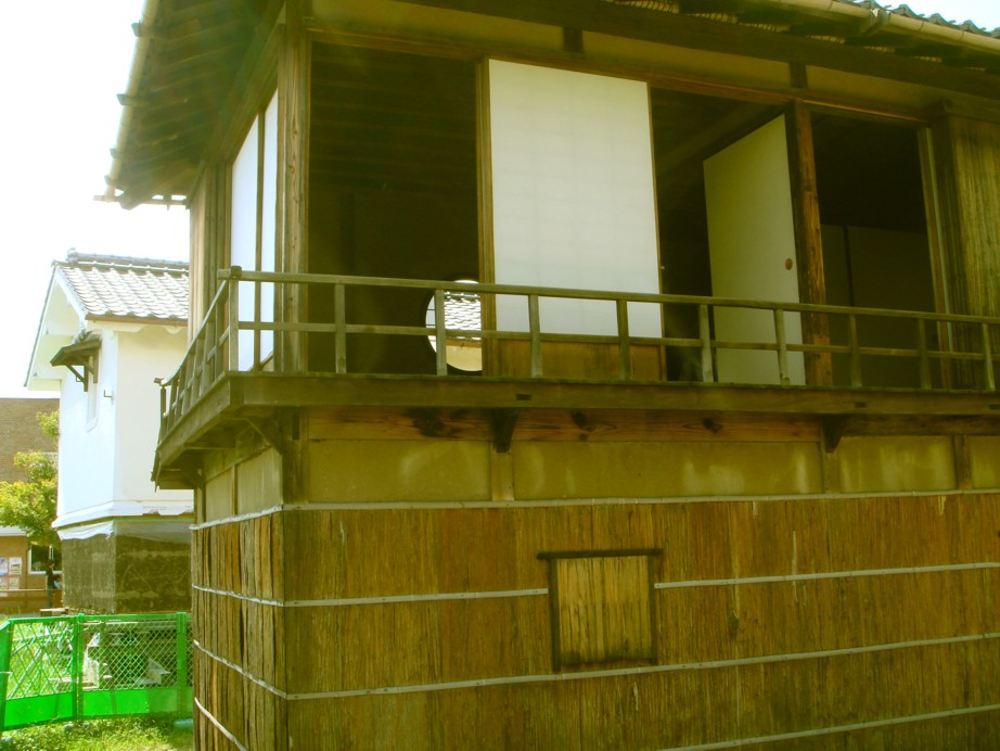 大分県日田市に19世紀前後から同末期にかけてあった私塾「咸宜園」の現存建築「遠思楼」の北側。